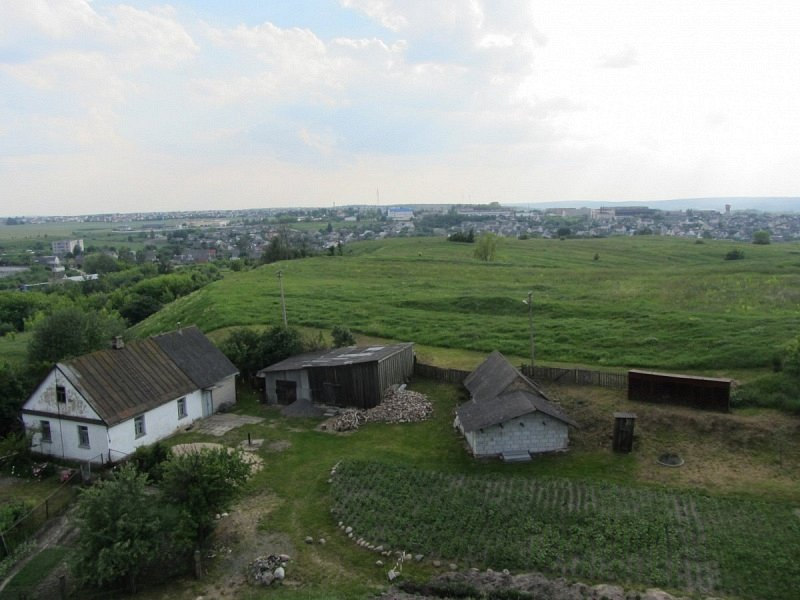 Ваўкавыск. Замчышча